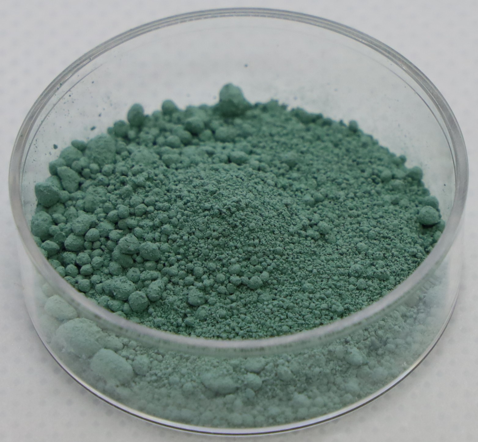 Uranium tetrafluoride powder